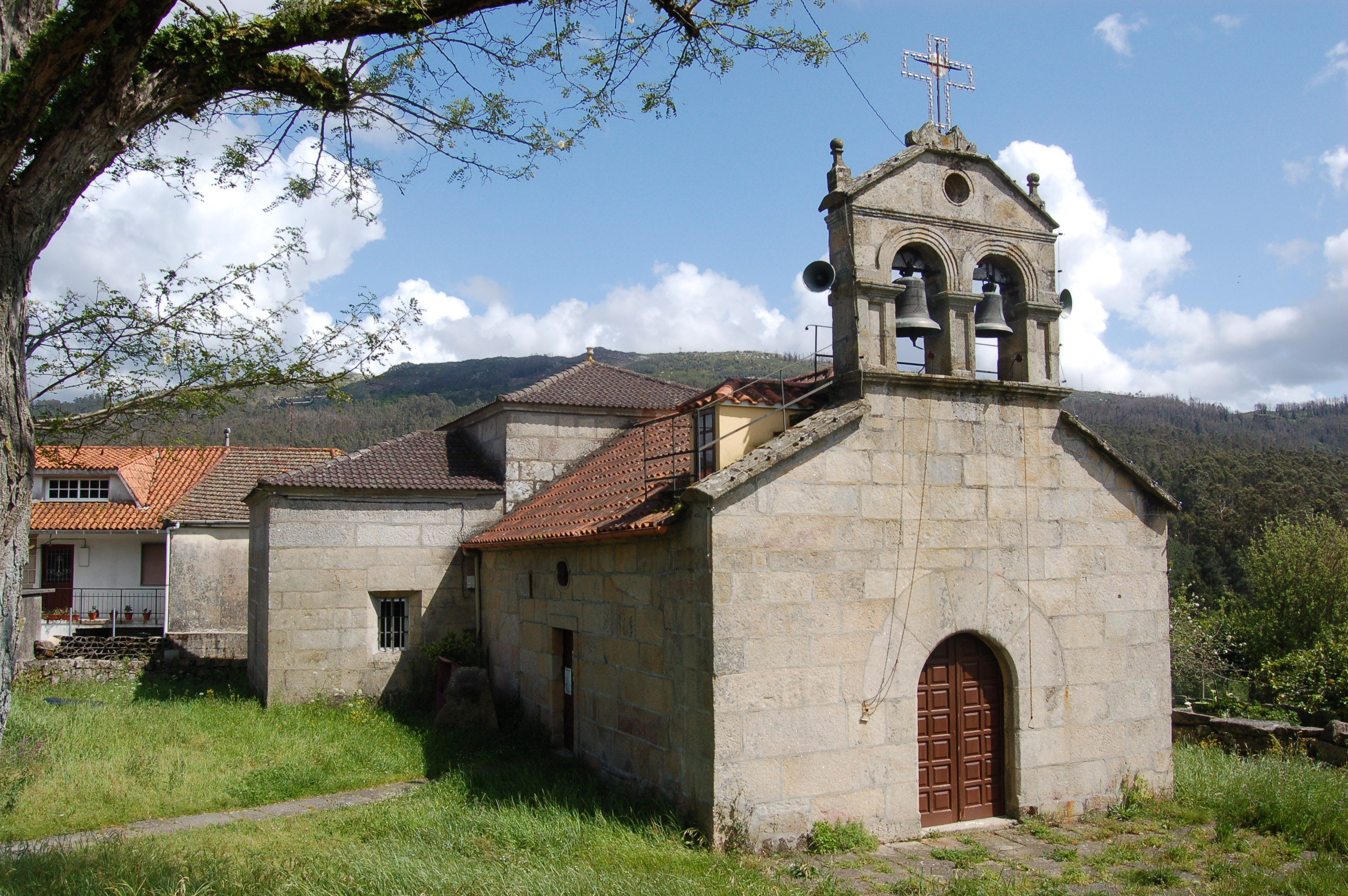 Igrexa parroquial de San Pedro de Tomeza (Pontevedra)